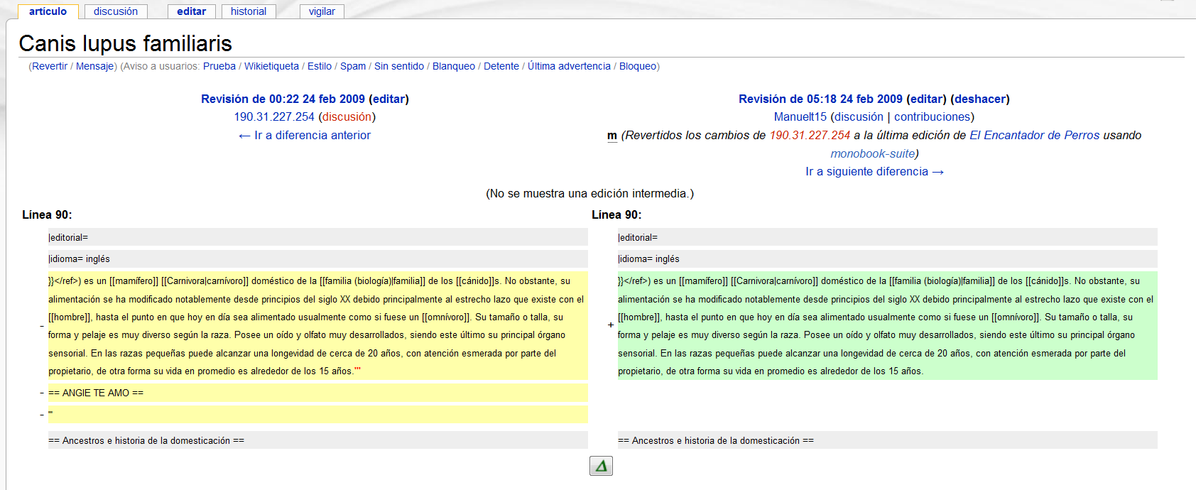 Un diff que muestra la eliminación de un vandalismo en el artículo Canis lupus familiaris de la Wikipedia en español. A diff showing the elimination of a vandalism in the article Canis lupus familiaris from the Spanish Wikipedia.